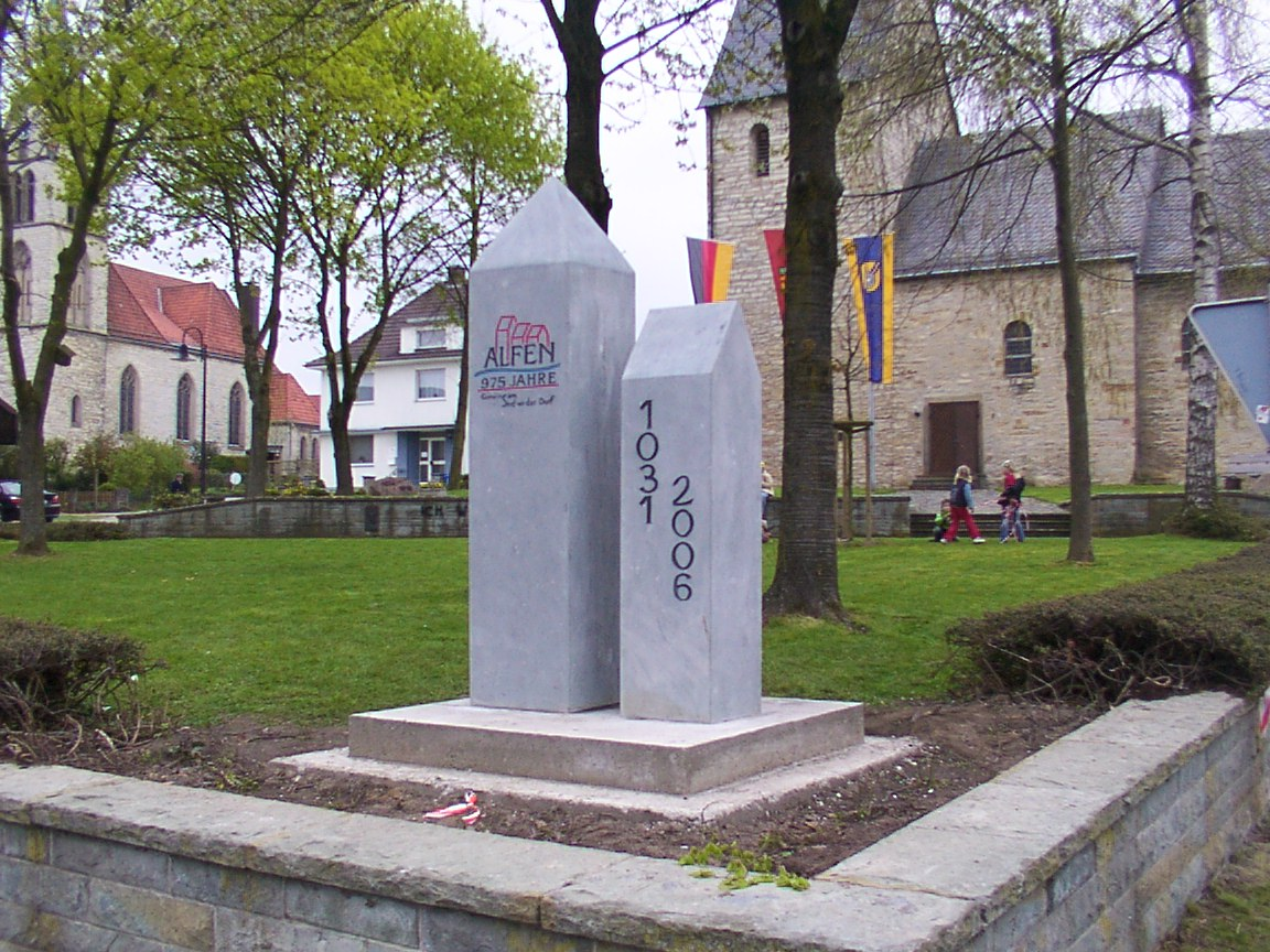 Borchen: Denkmal zur 975-Jahrfeier in Alfen